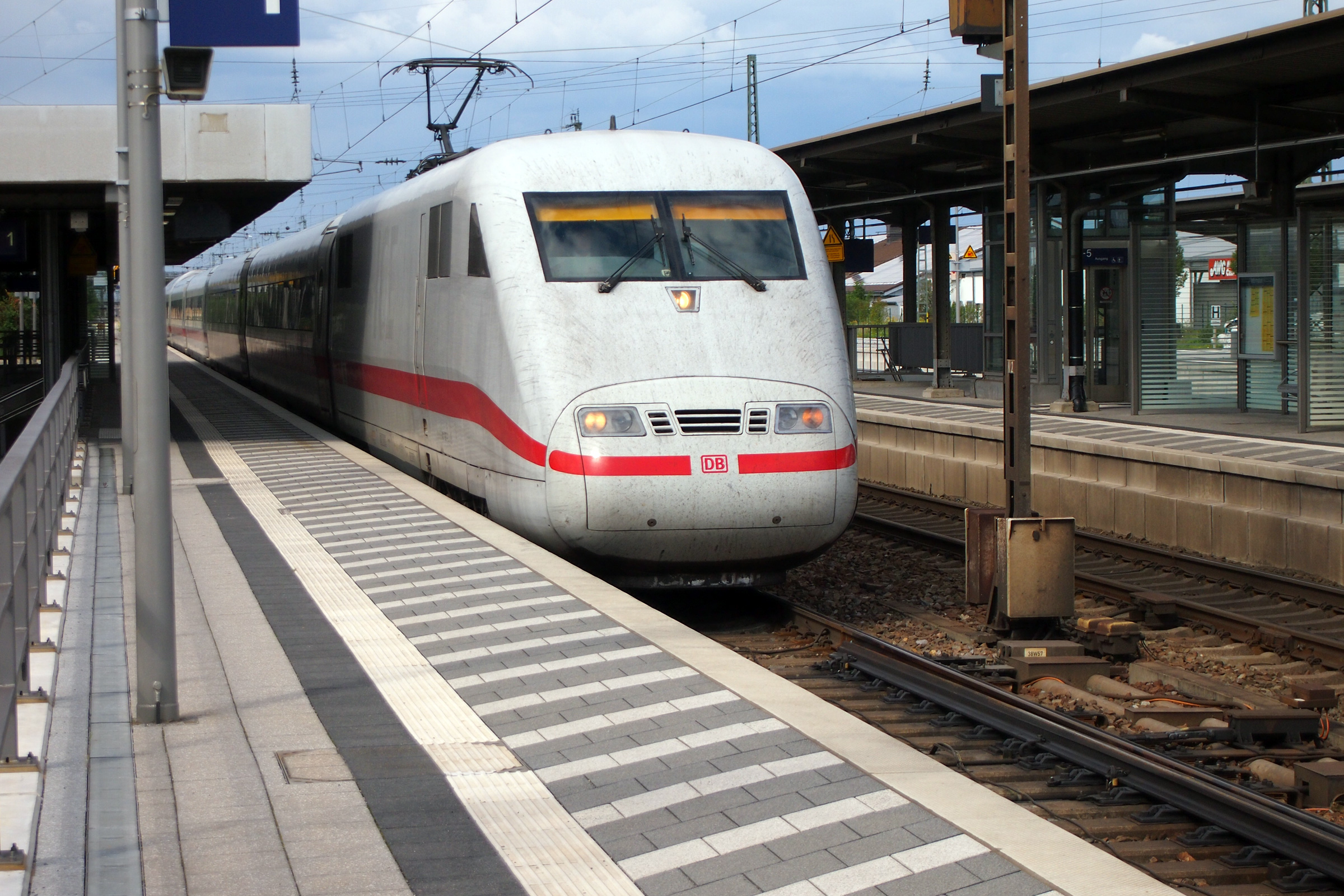 Bahnhof Graben - Neudorf. ICE "Timmendorfer Strand" bei der Durchfahrt